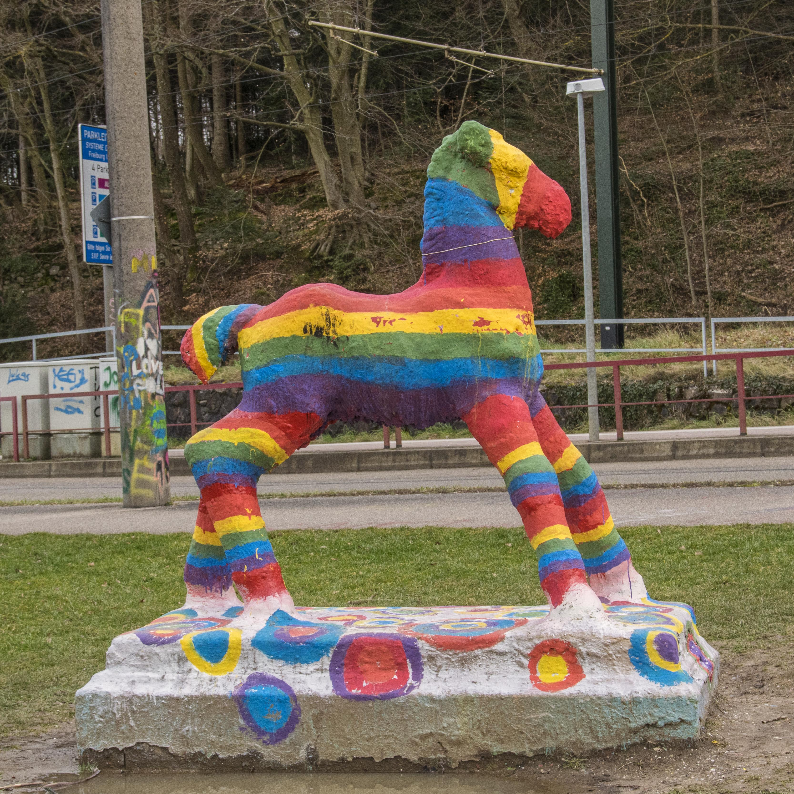 Bilder aus Freiburg im Breisgau Das Holbeinpferdle am 16. 02. 2014 Beschriftung des Pferdles Für Toleranz und Vielfalt in den Schulen Sexuelle vielfalt in den Bildungsplan